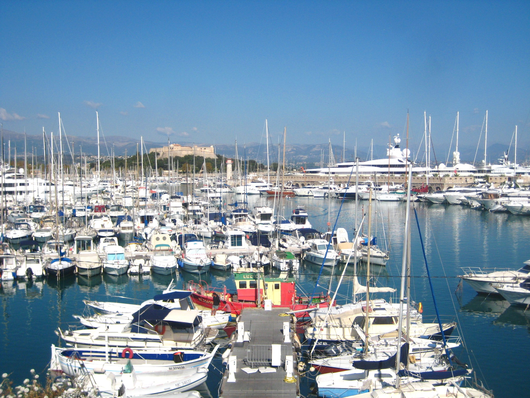 Description vue port Antibes vue port Antibes